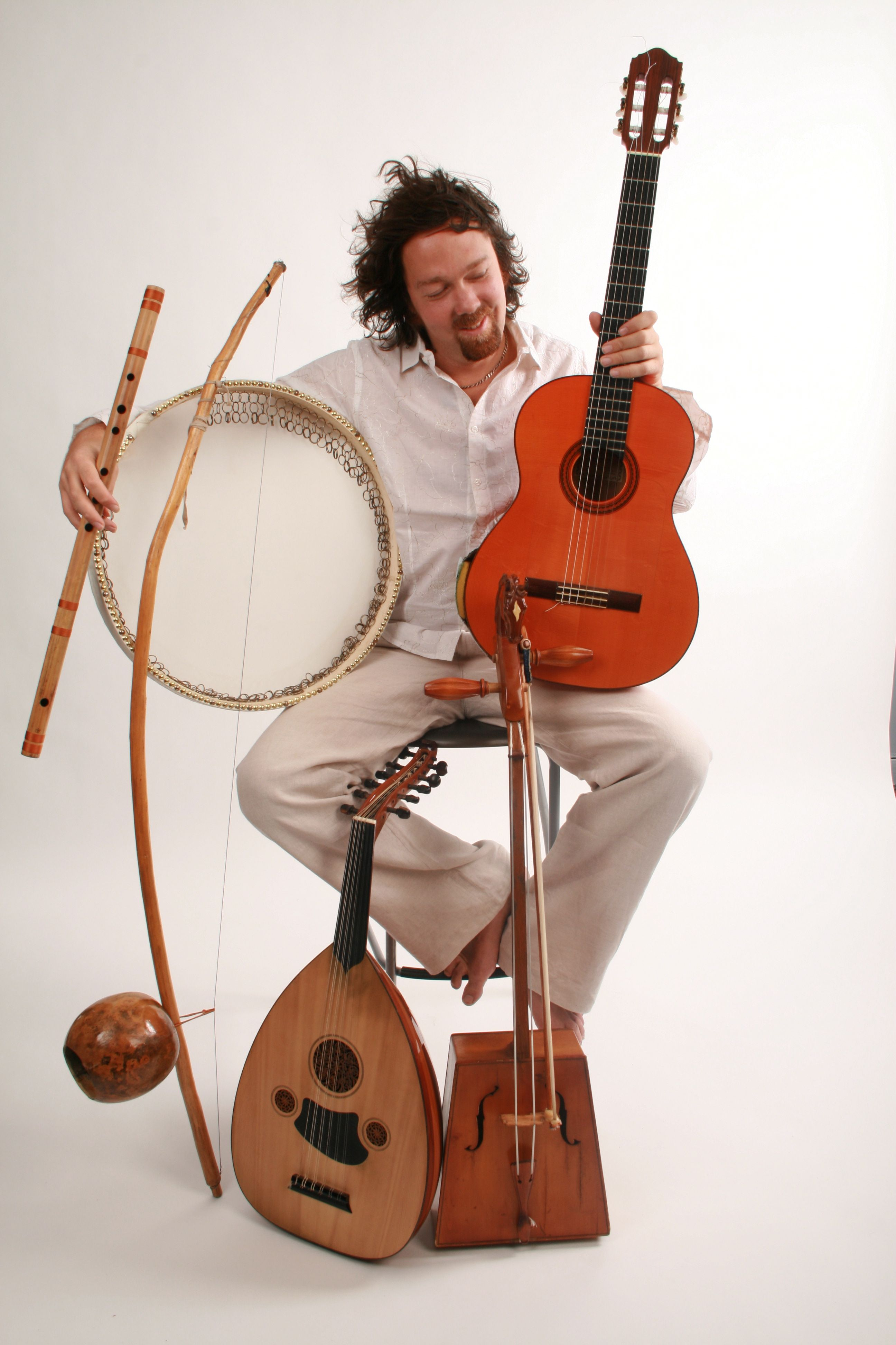 Mathias Duplessy